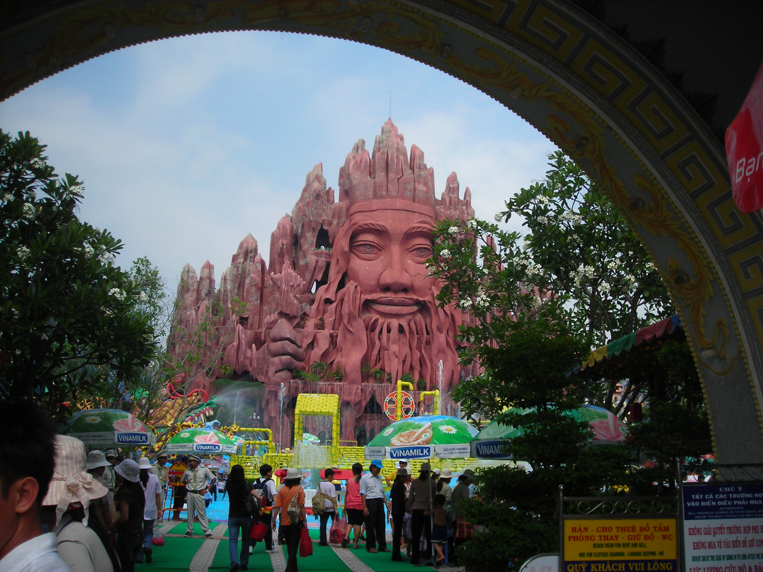 Tien Dong man-made sea in Suoi Tien Park, Saigon do công ty kiến sơn thiết kế